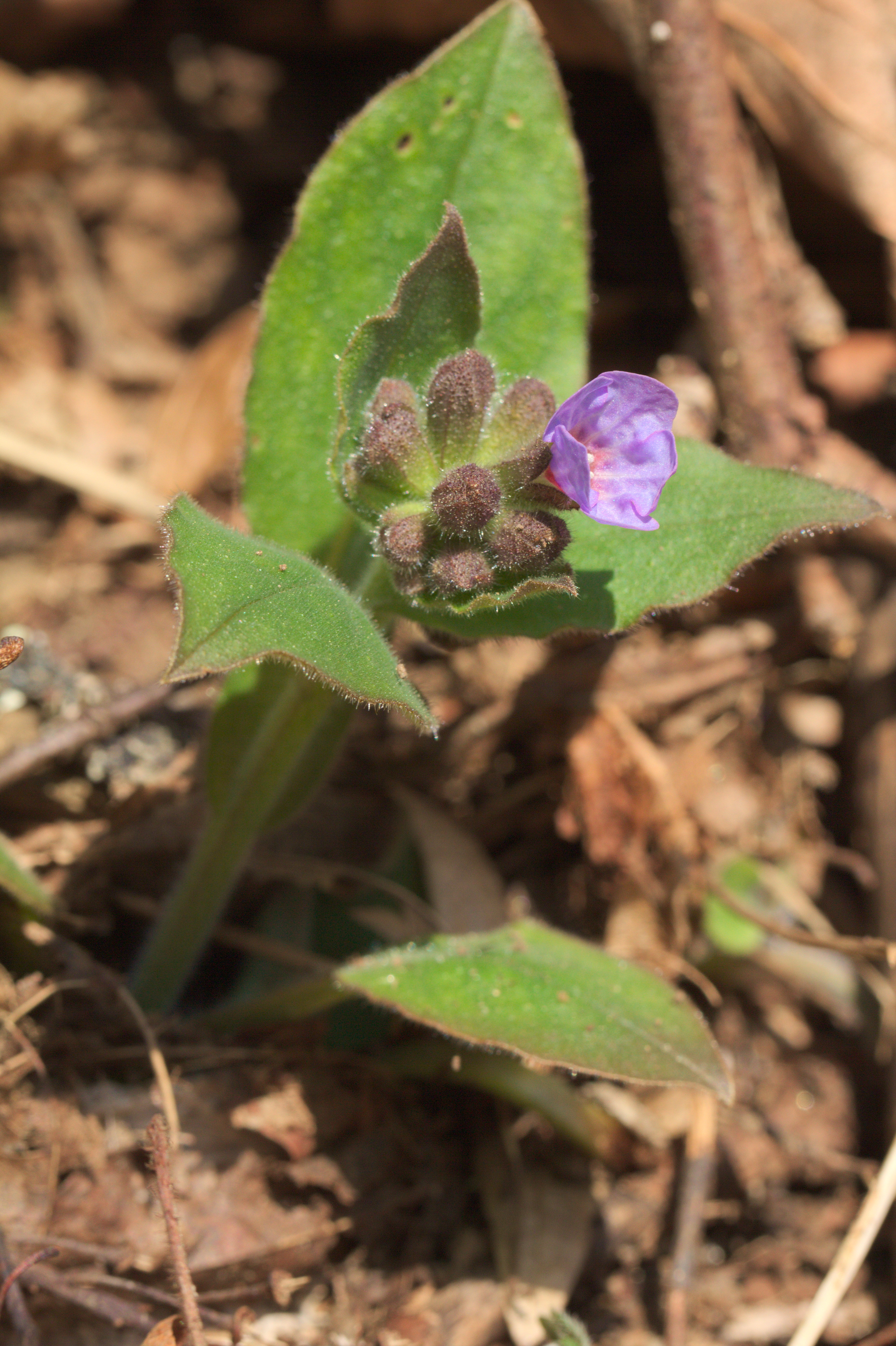 Bílý kříž (přírodní rezervace) - Pulmonaria officinalis L., plicník lékařský - status ohrožení v ČR: není